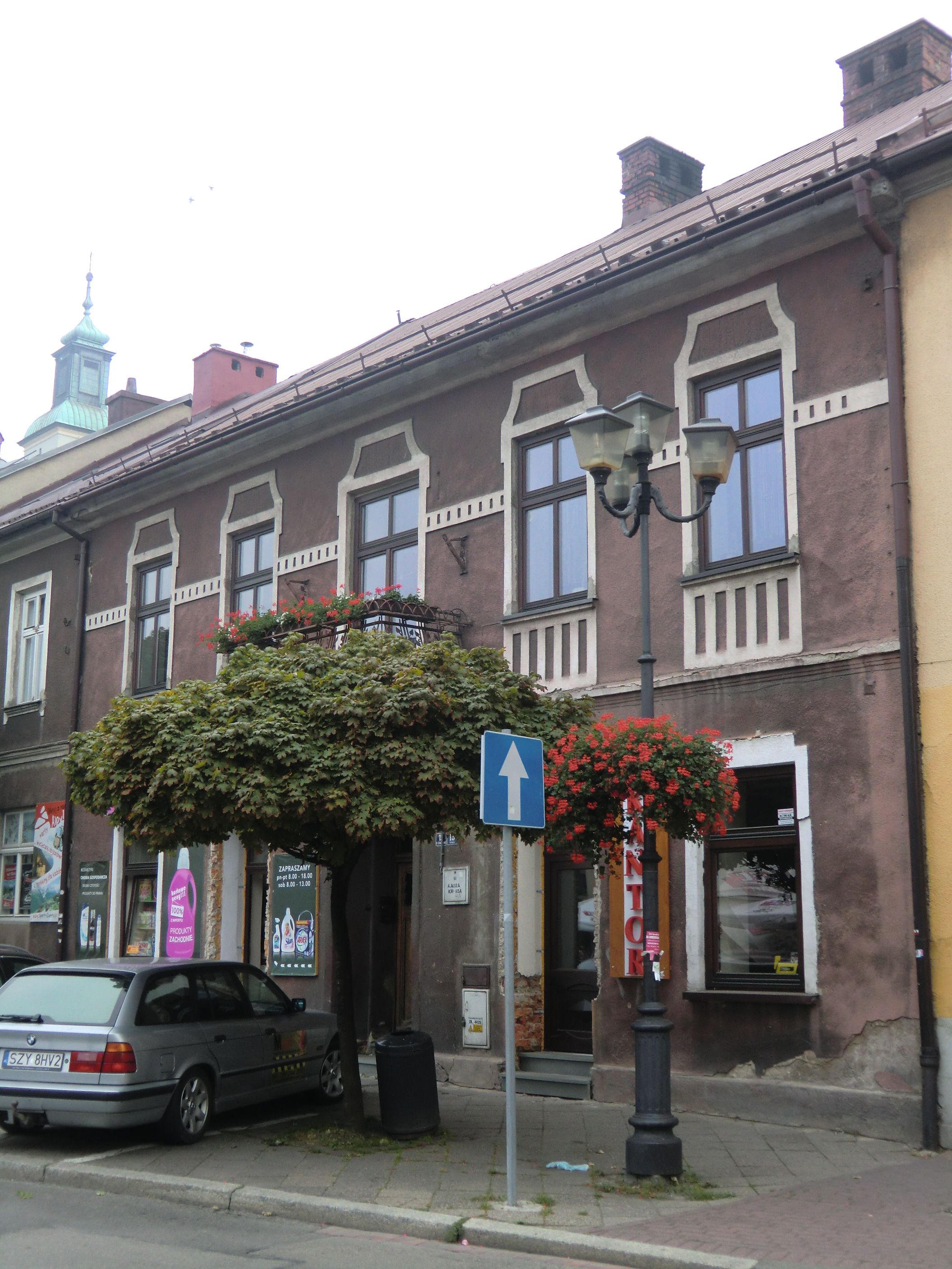 Kamienica, Żywiec Rynek 15